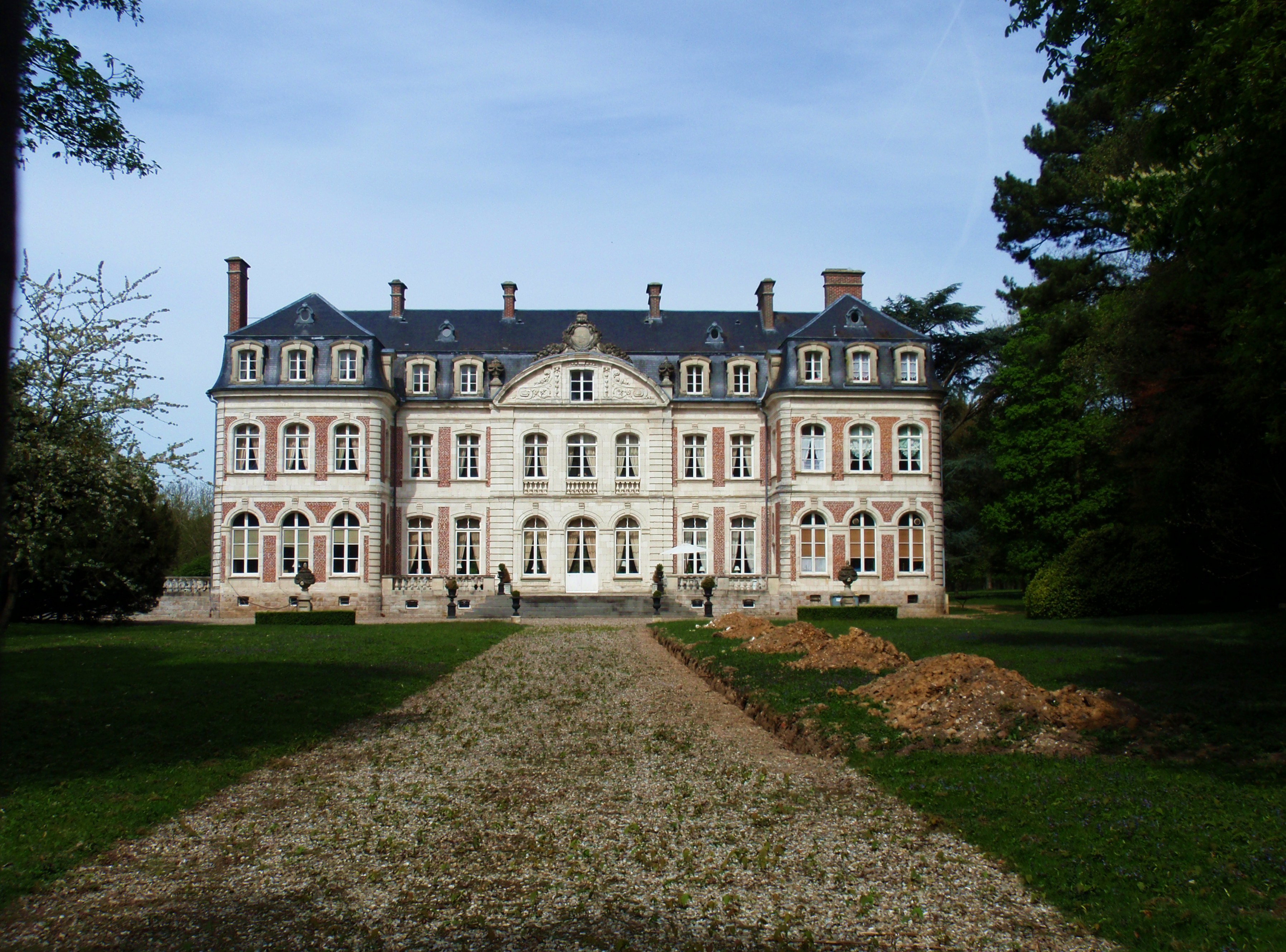 Le château de Remaisnil, Somme, France